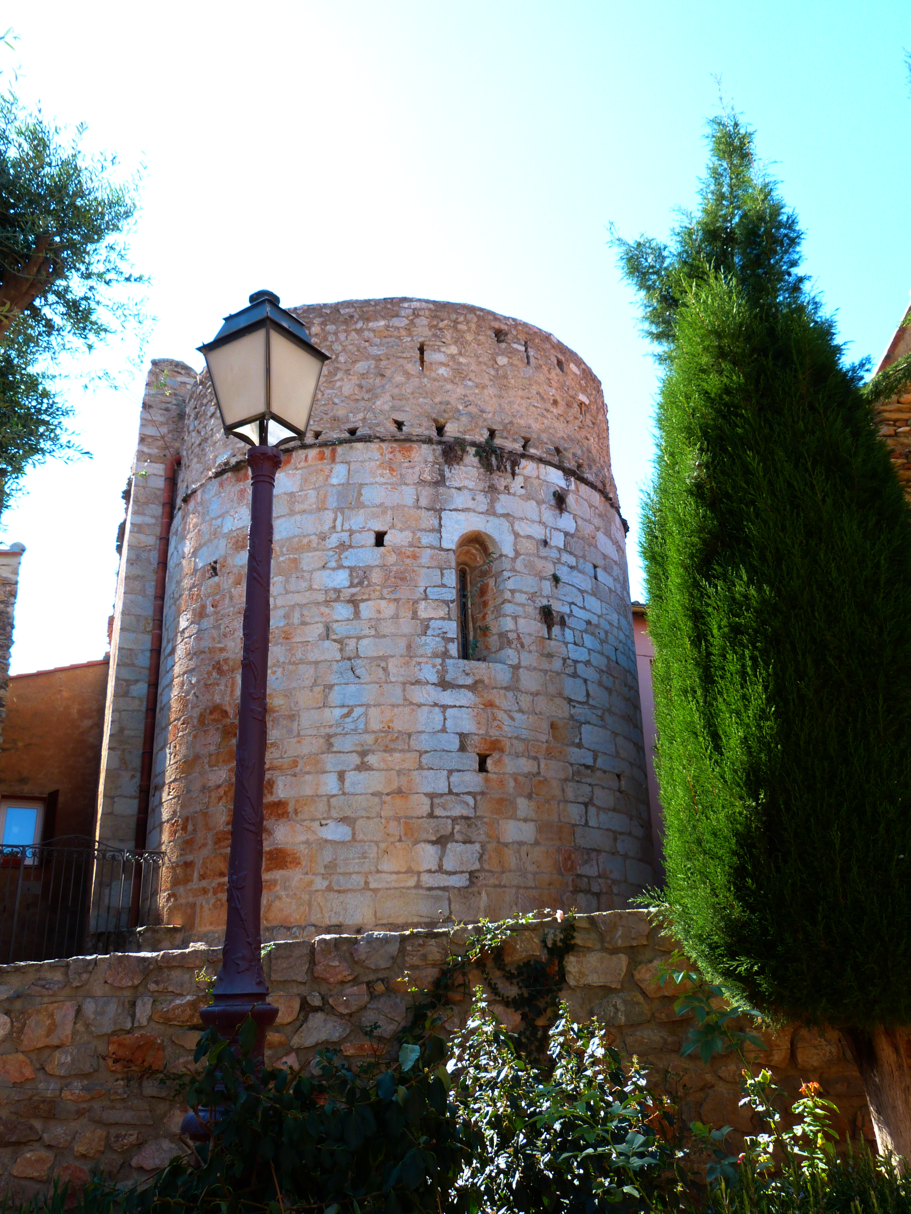 Église Sainte-Colombe de Sainte-Colombe-de-la-Commanderie